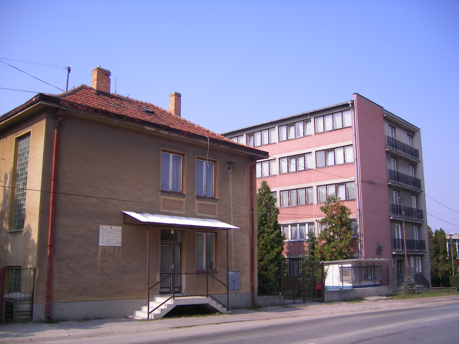 Udvard - szakközépiskola